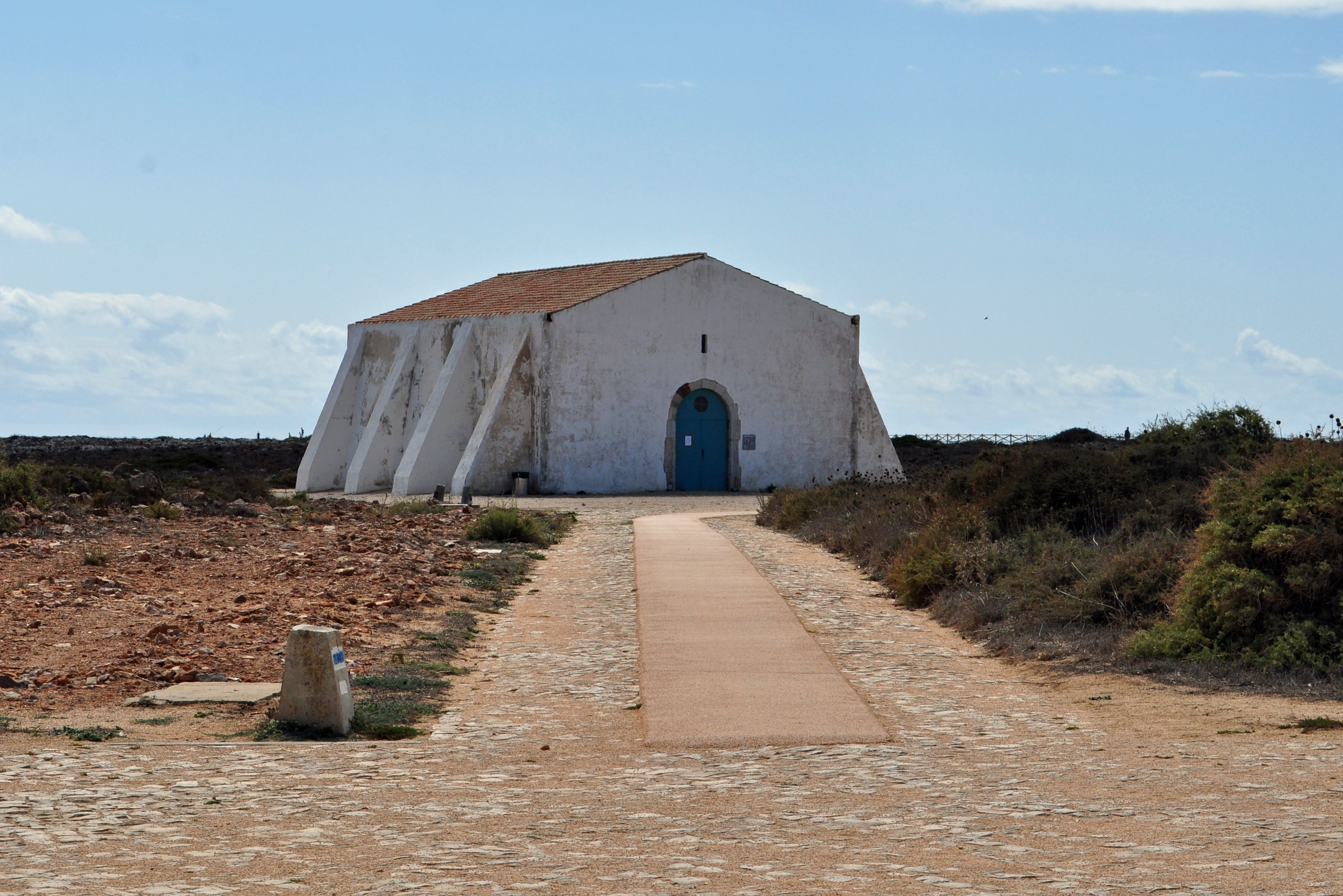 Fortaleza de Sagres (2012-09-25), by Klugschnacker in Wikipedia (47)